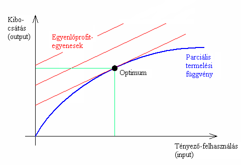 Vállalati profitmaximalizálás a mikroökonómiai termeléselmélet modelljében